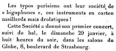 Un bal donné par la société bigophonique des typographes parisiens en 1899.